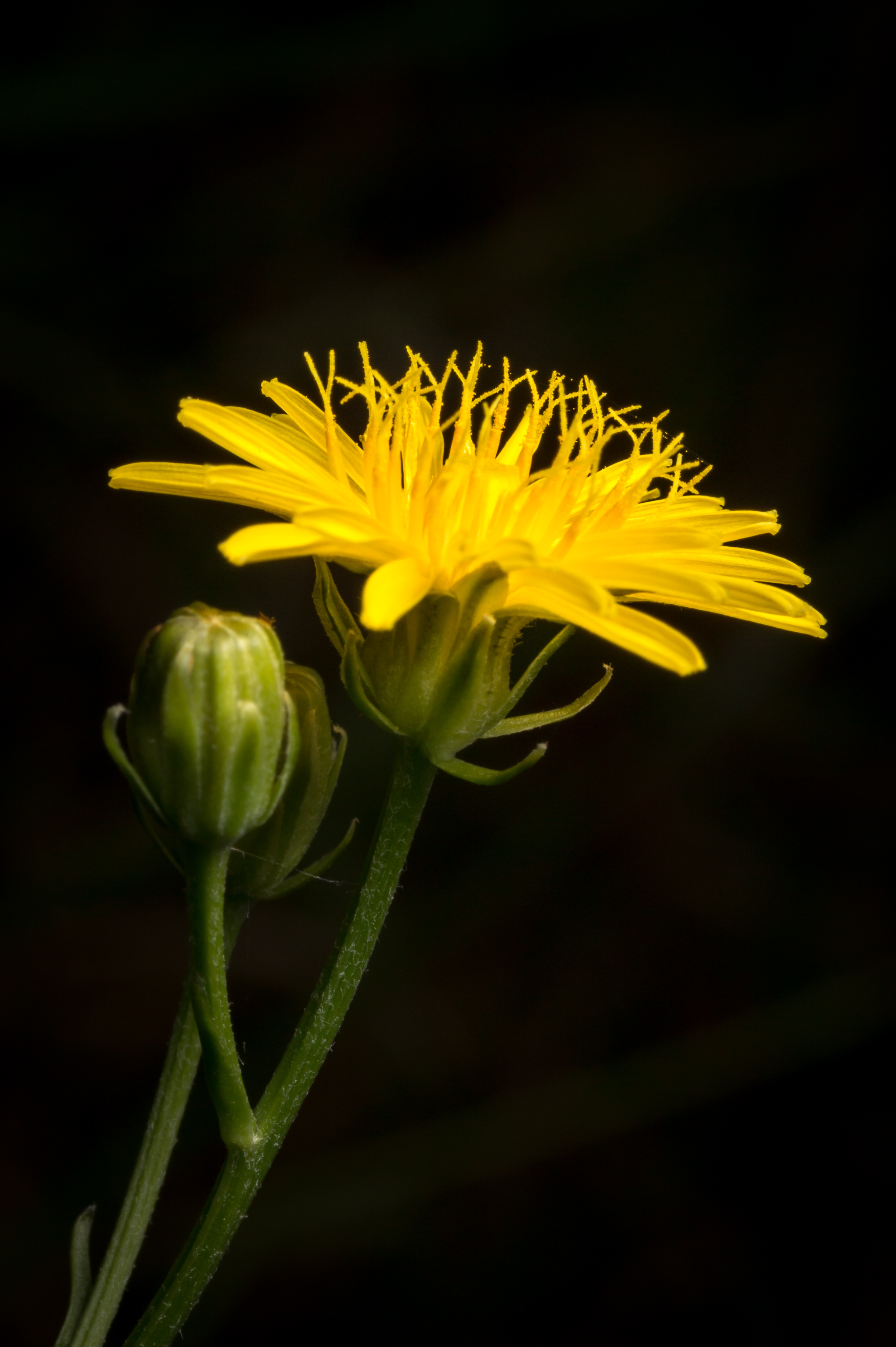 Löwenzahn-Pippau (Crepis vesicaria)